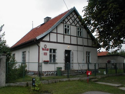 Zabytkowy budynek w którym była poczta w Słoneczniku o charakterystycznej w tym regionie konstrukcji szachulcowej